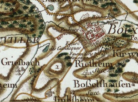 Bouxwiller cartographiée au XVIIIe siècle